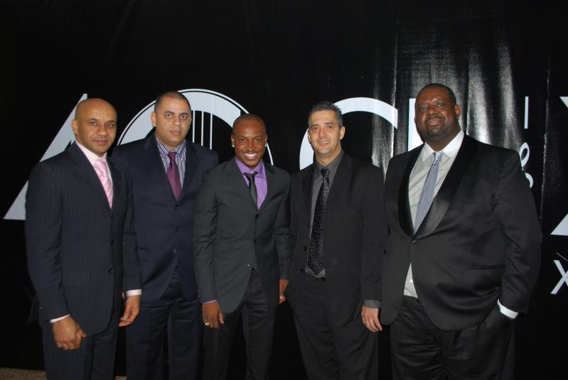 Exaltasamba no CH & X 40 Anos.